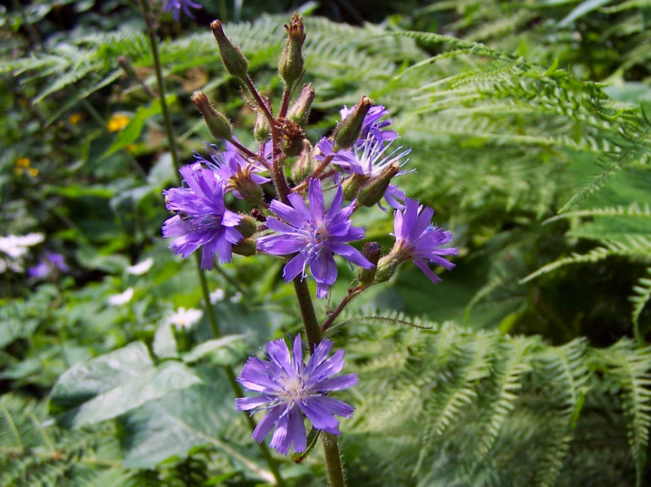 Mulgedium alpinum (pl. modrzyk górski), habitat: Tatra Mountains, Dolina Strążyska